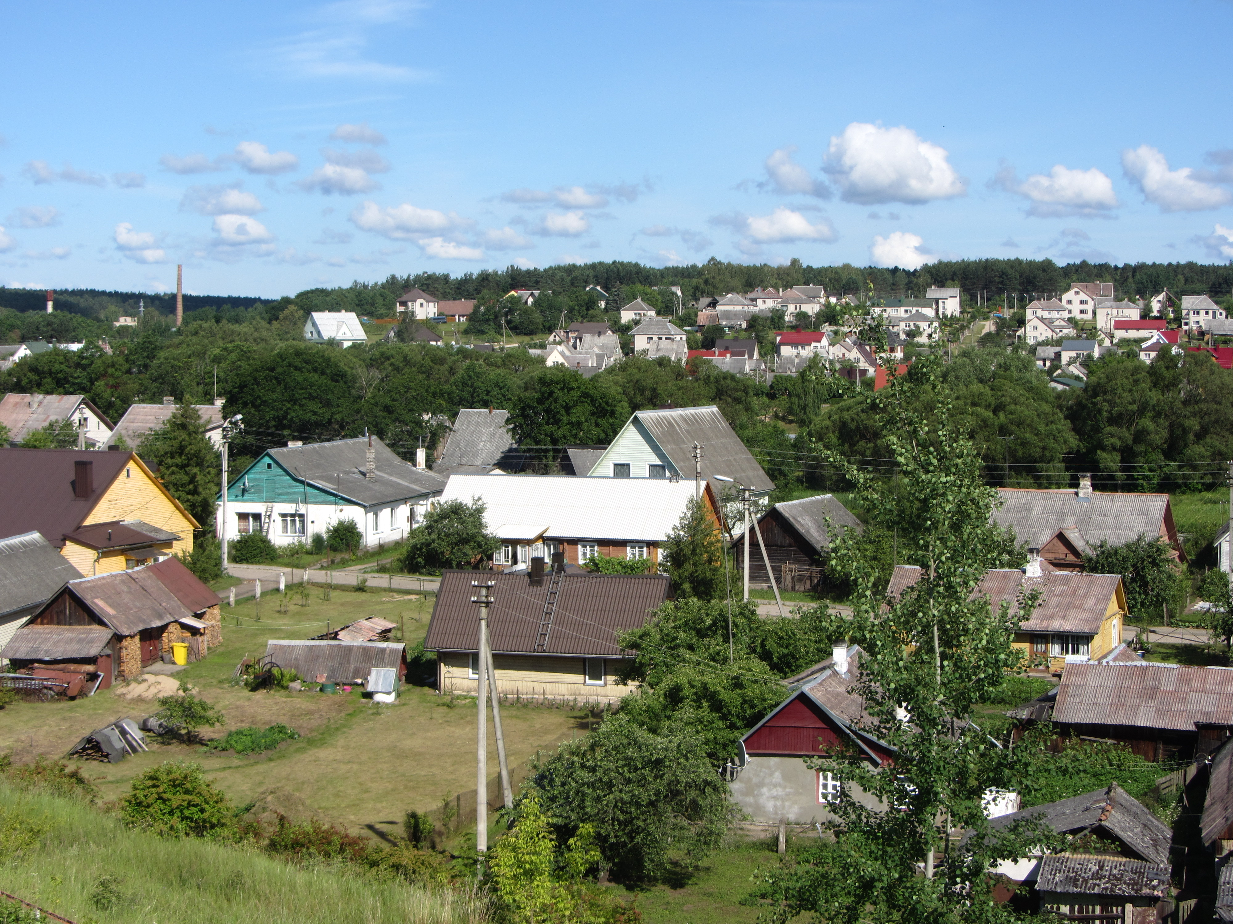 Pabradė, Lithuania